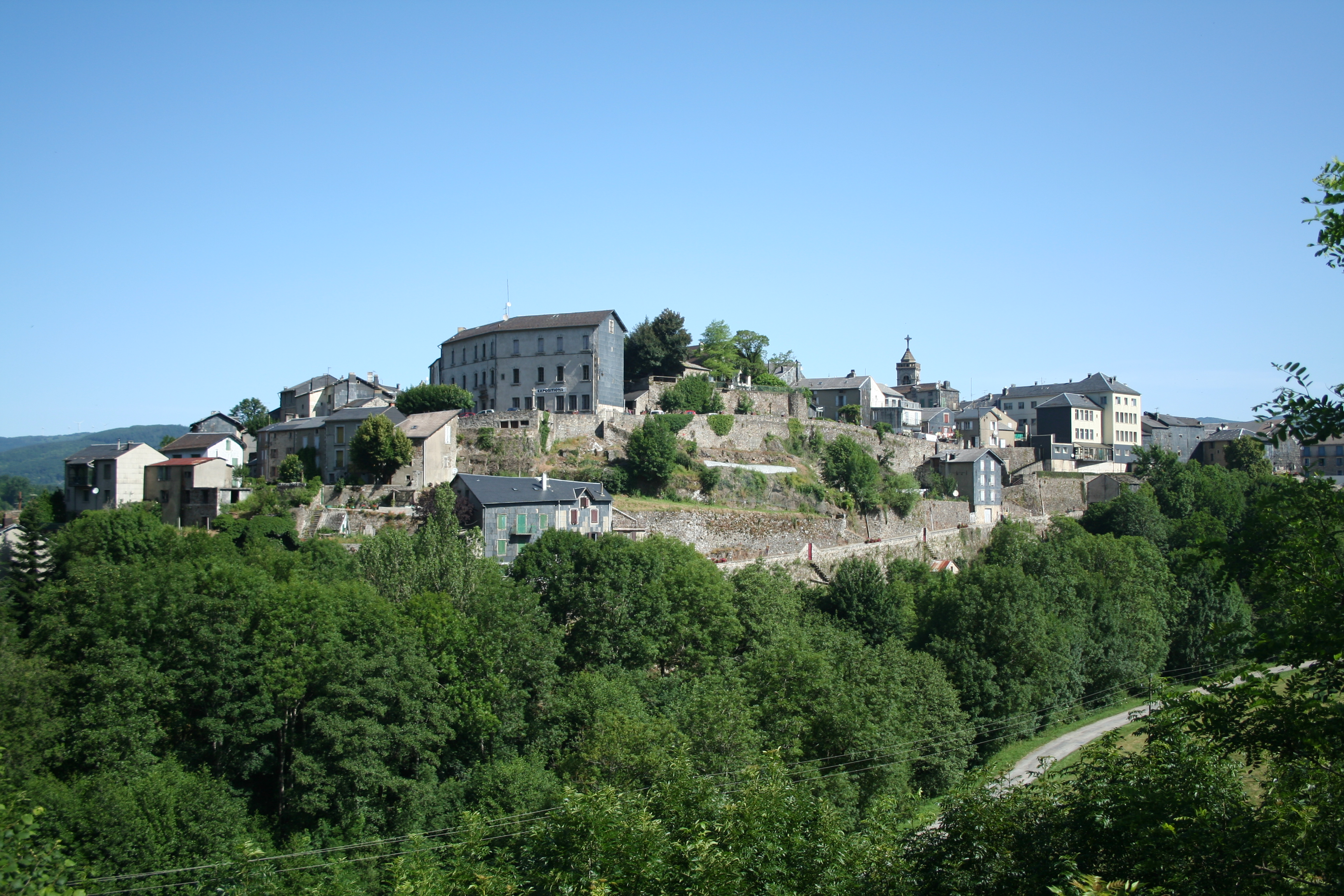 La Salvetat-sur-Agout (Hérault), vue générale.